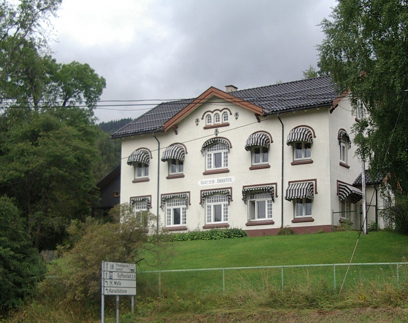 Kviteseid Folkebibliotek. Arkitekt Børves bygg fra 1911 i sentrum av "Kviteseidbyen"